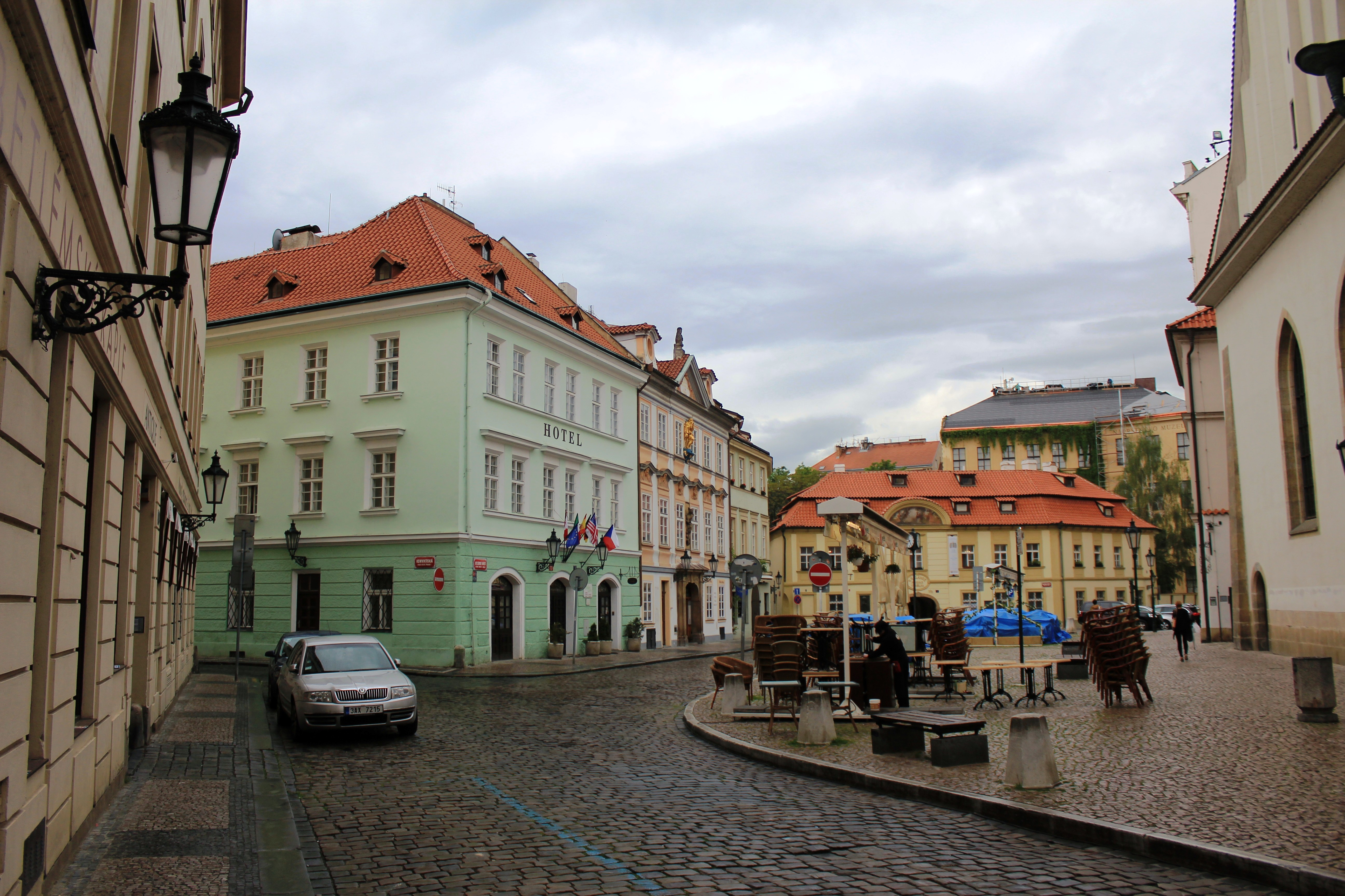 Betlehemsplassen